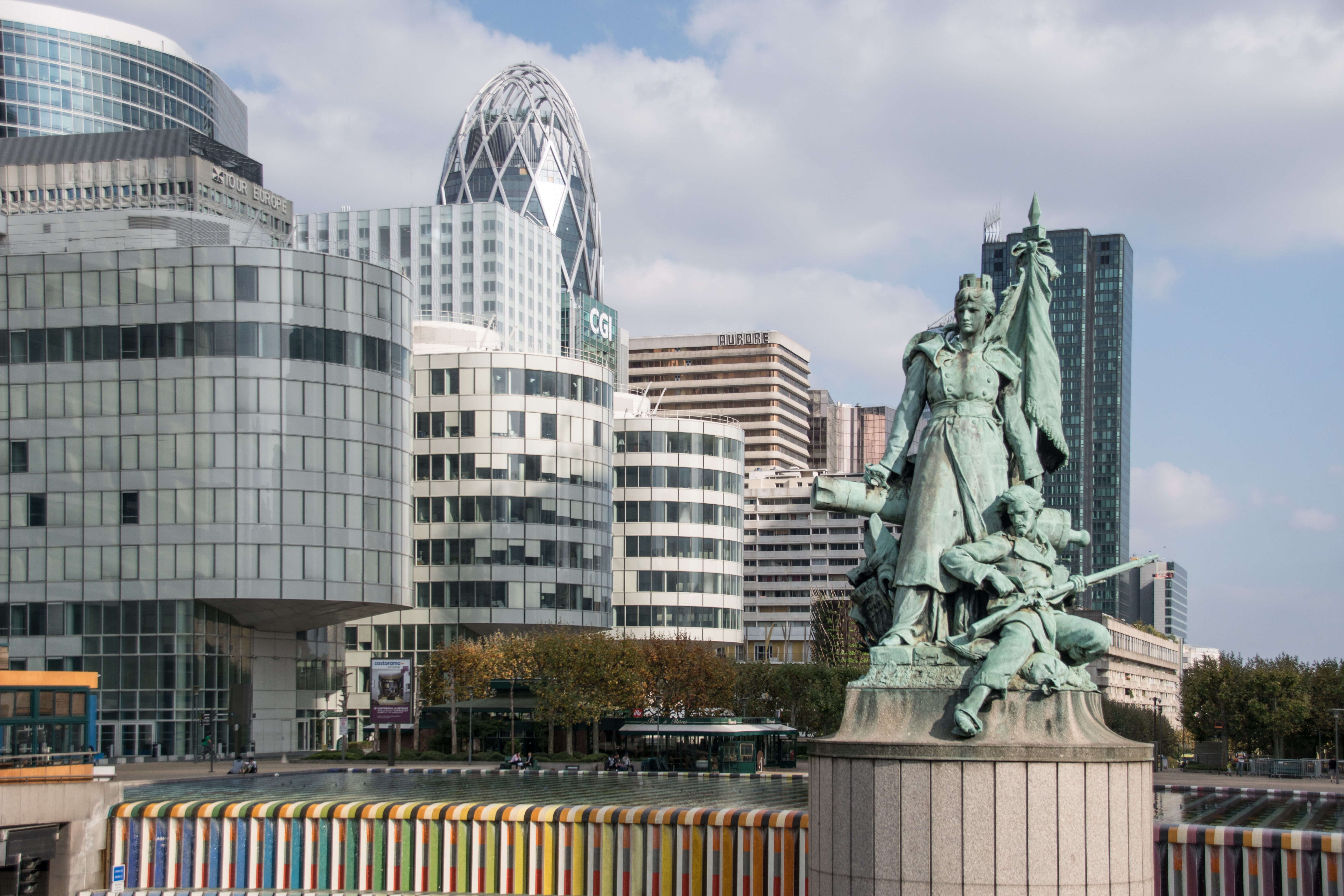 Diese Denkmal ehrt die Verteidiger von Paris im Krieg von 1870. Es ist Namensgeber des neuen, modernen Stadtteils.